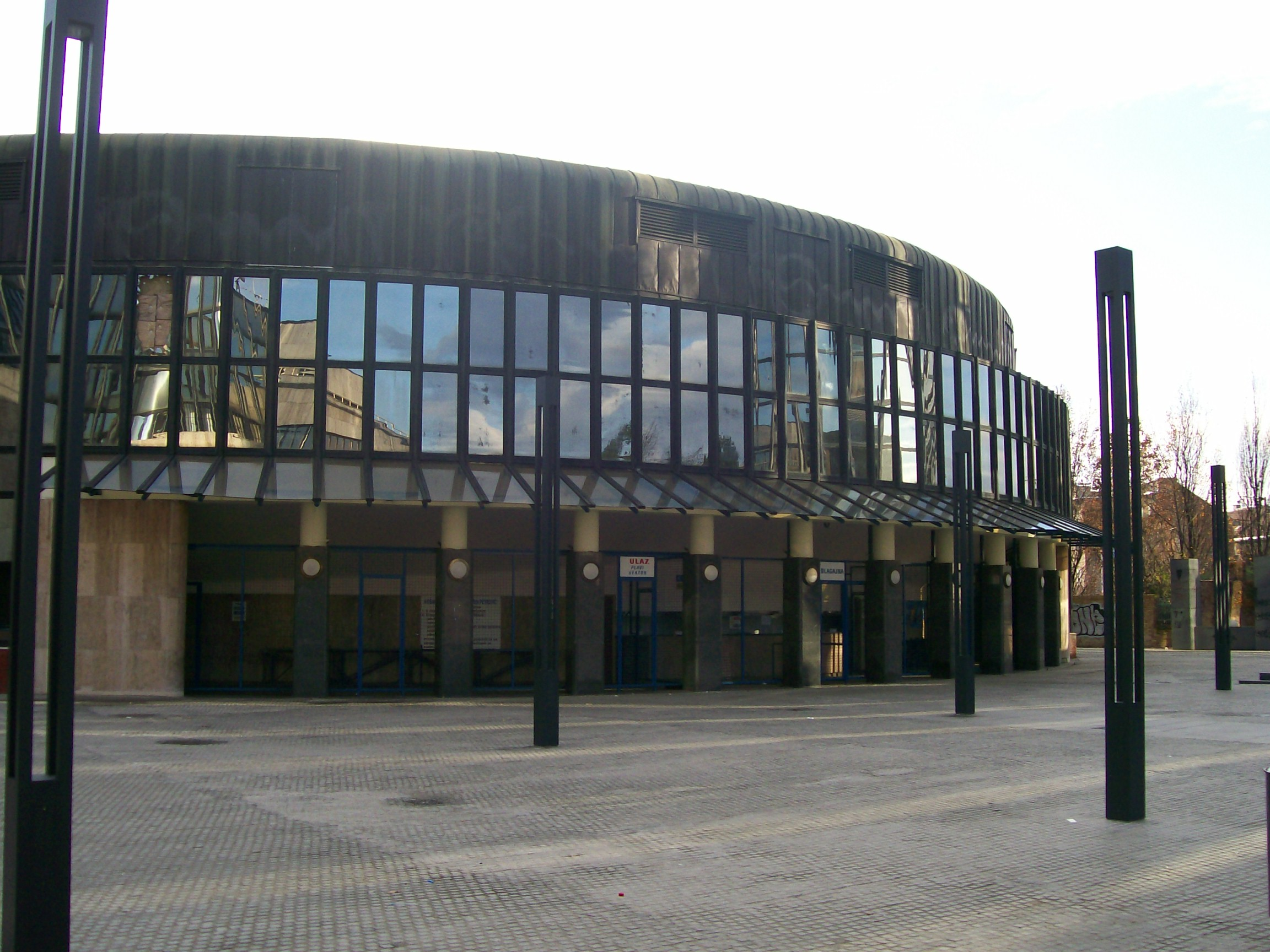 Dvorana Dražen Petrović u Zagrebu